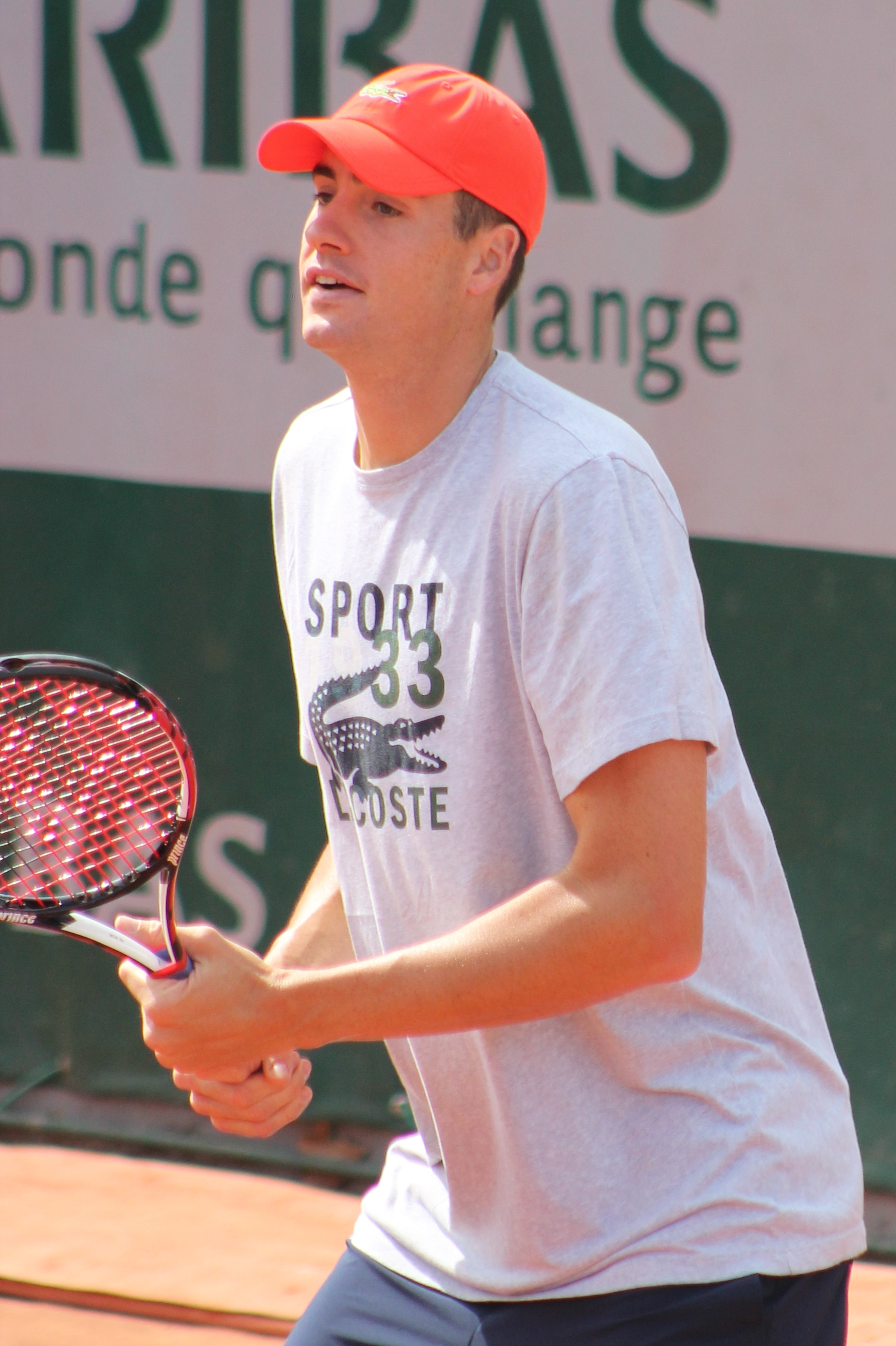 Isner RG15 (3)